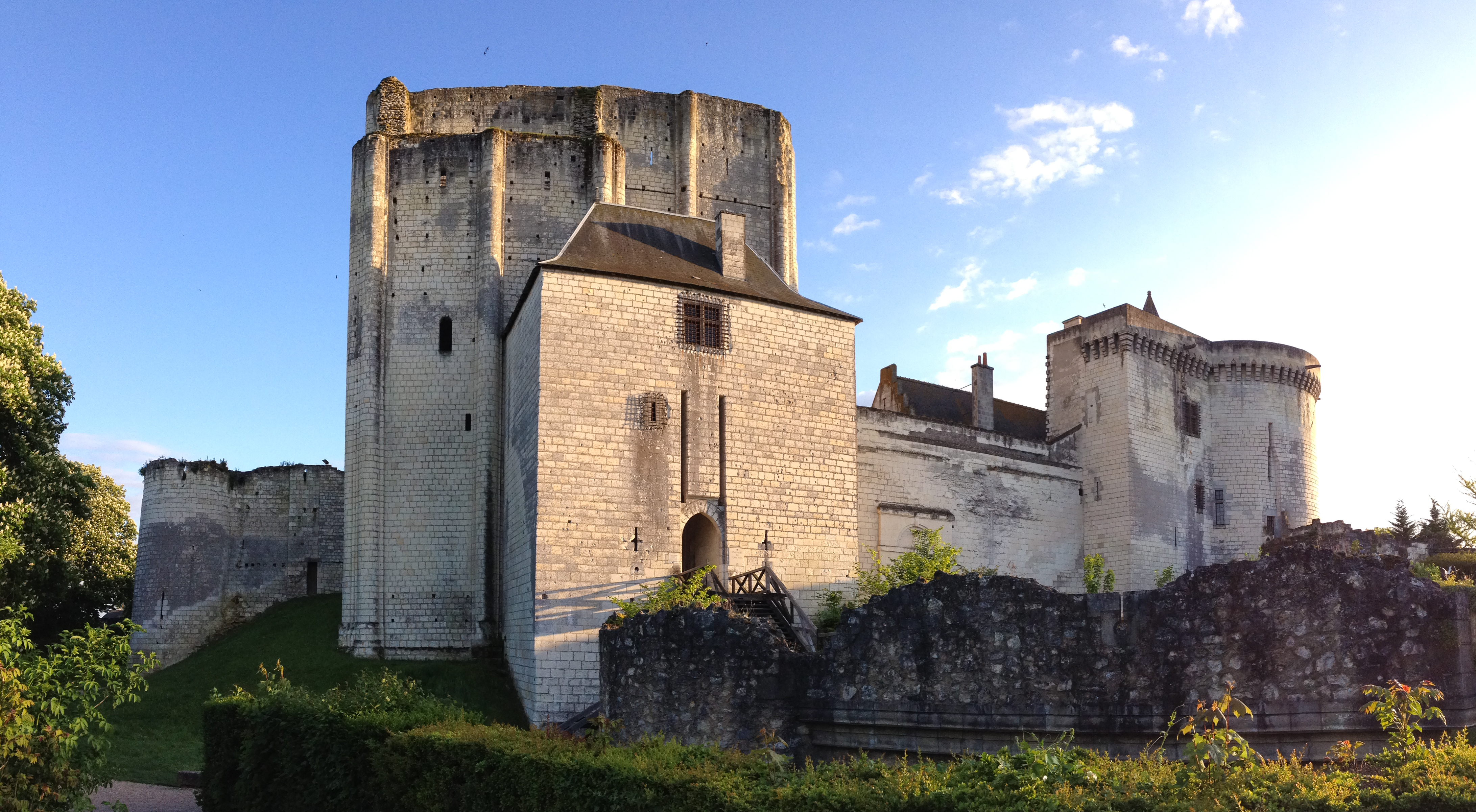 Château de Loches